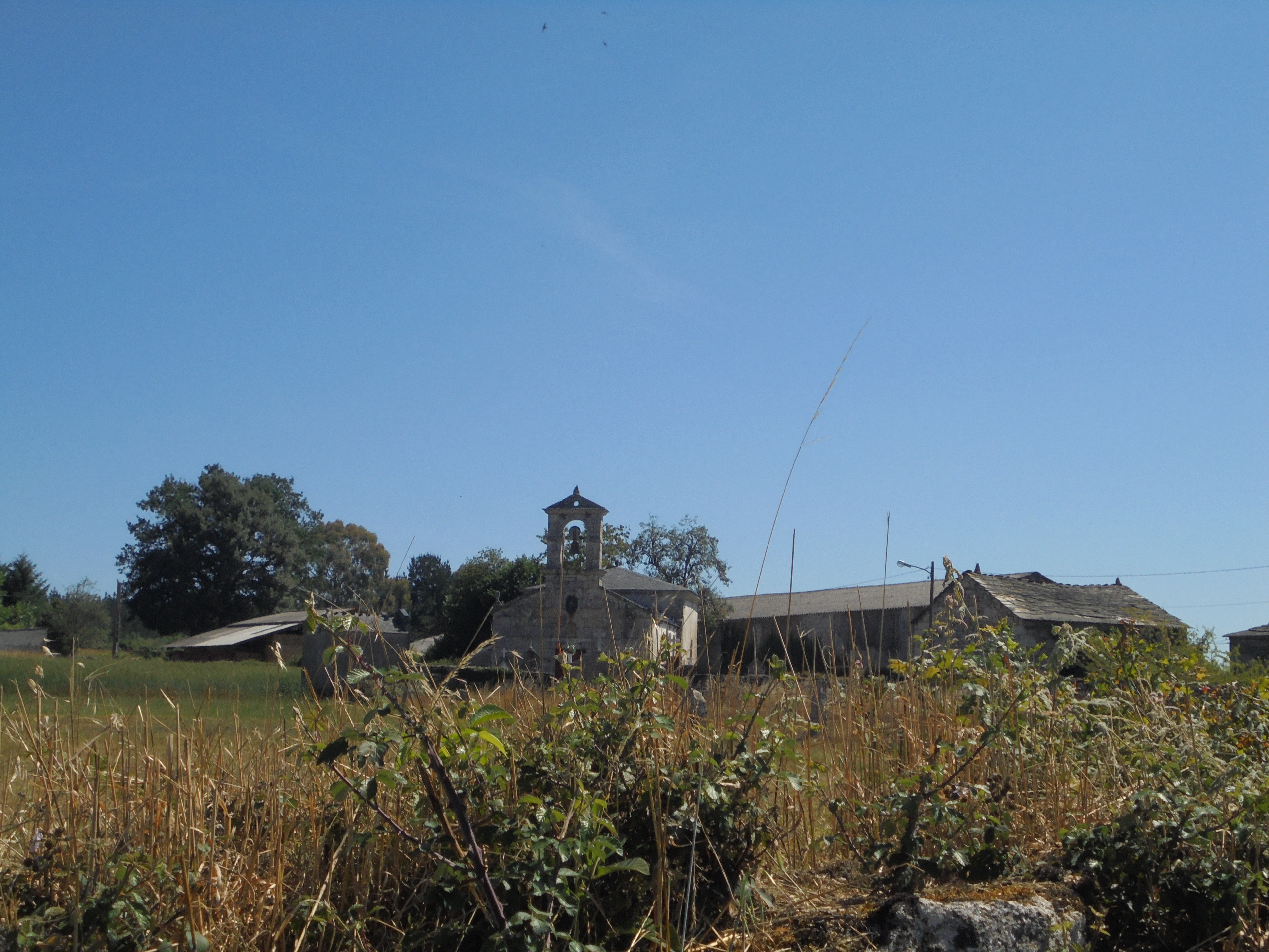 Igrexa de San Xoán de Segovia (O Corgo)